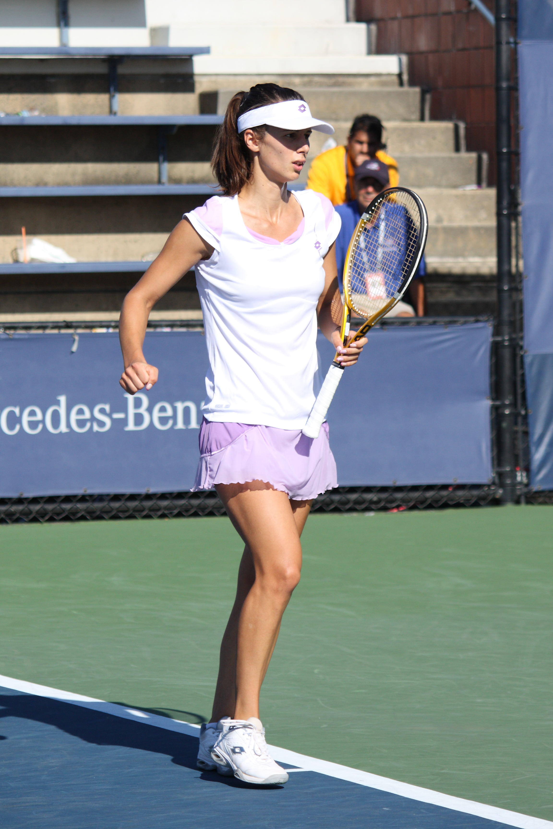 Tsvetana Pironkova at US Open 2010